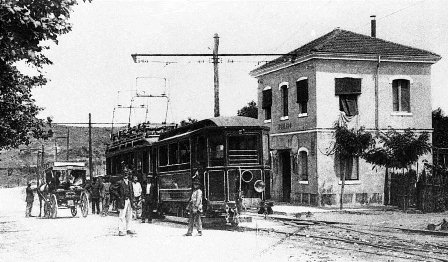 Morlupo - Tram